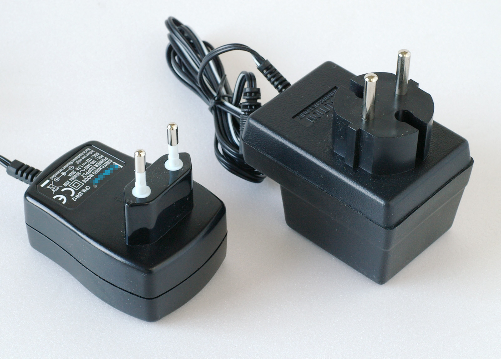 Zwei Steckernetzteile, links als Schaltnetzteil mit einer Ausgangsleistung von 20 Watt, rechts konventionell (Trafo/Gleichrichter) mit einer Ausgangsleistung von 3,6 Watt